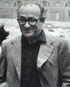 Il regista Valerio Zurlini Foto tratta da "Oggi", 1973